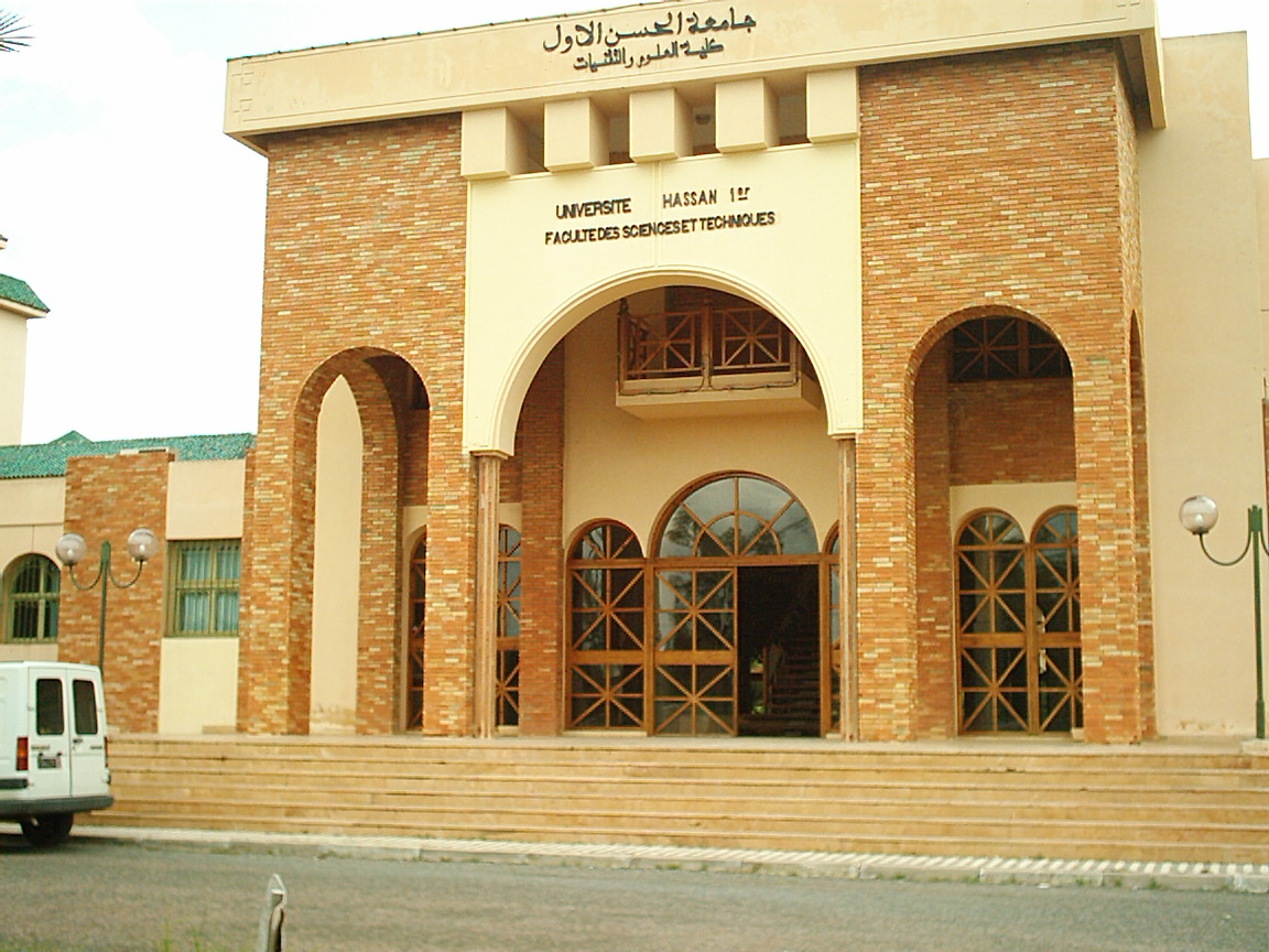 FST Settat etablissement d accueil